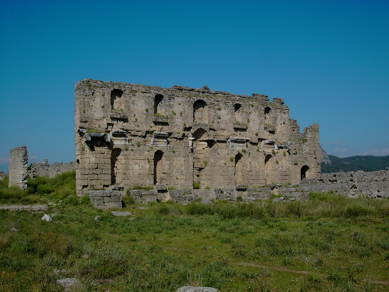 Nympaeon in Aspendos